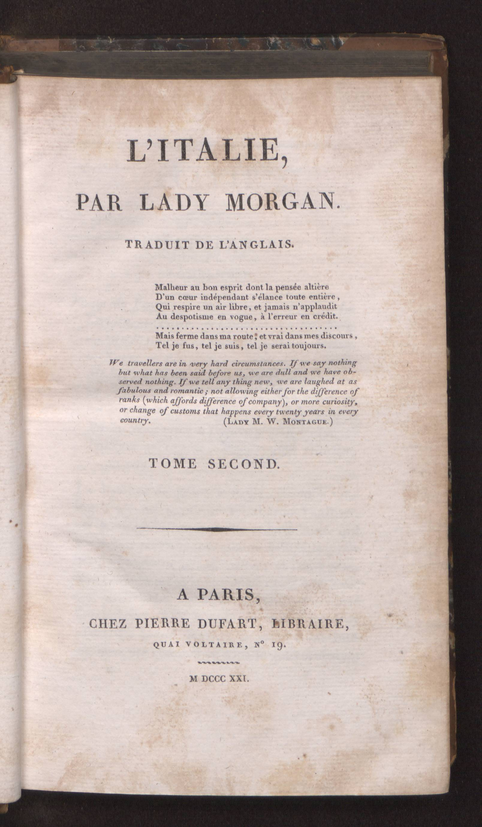 Frontespizio